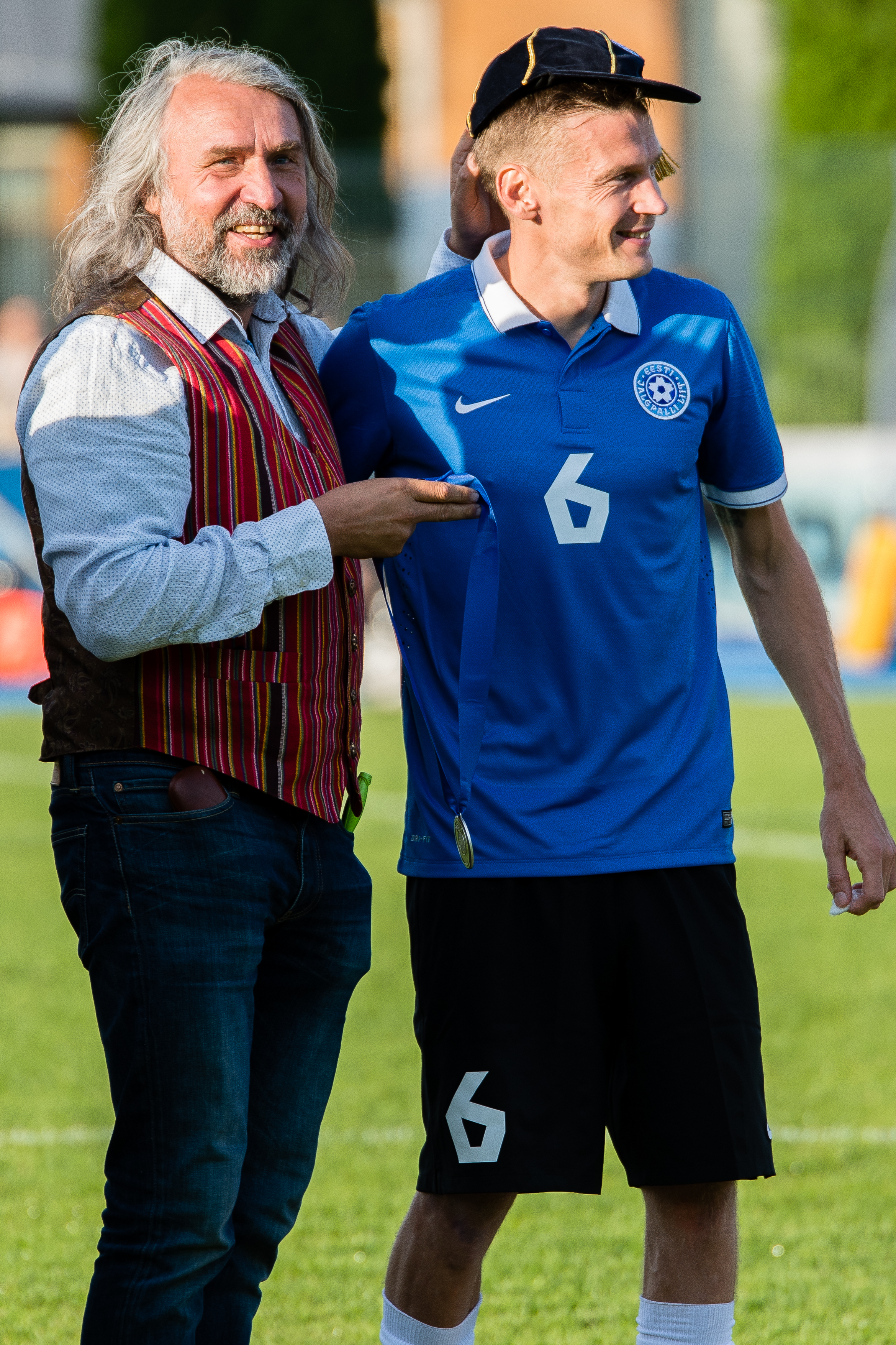 Aivar Pohlak õnnitlemas Aleksandr Dmitrijevi rahvuskoondise eest peetud 100. mängu eel enne Eesti-Malta 31.08.16 kohtumist